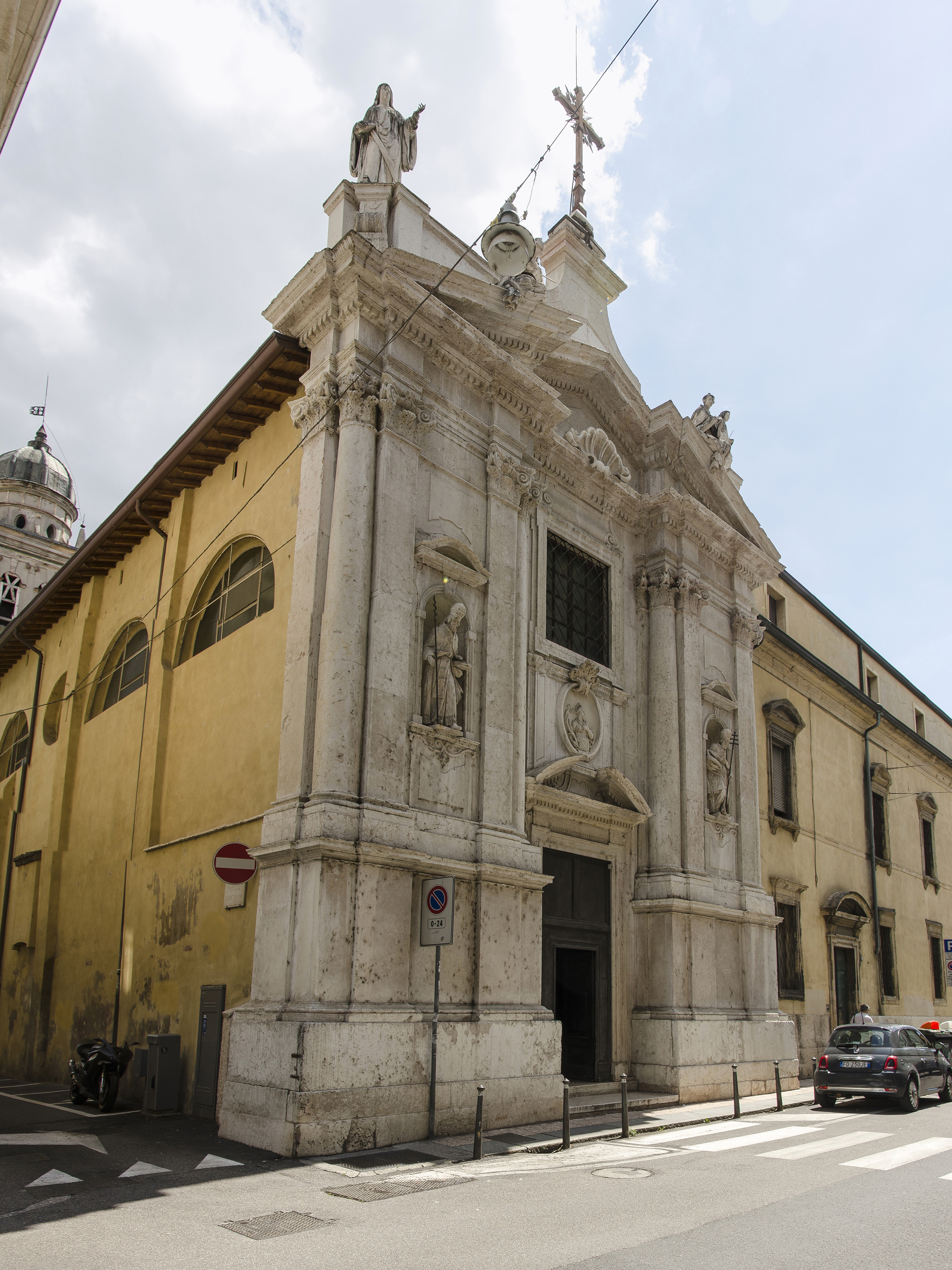 Chiesa di Santa Caterina alla Ruota, esterno, Verona